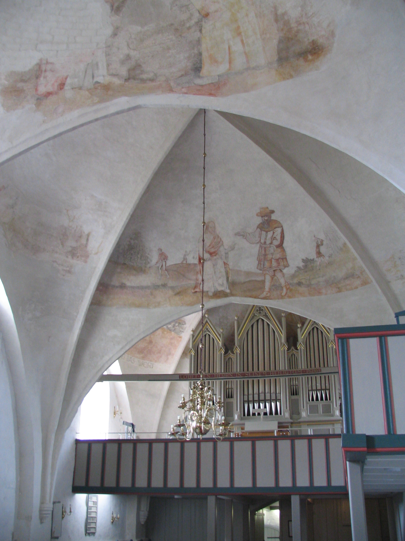 Deckengewölbe und Kirchenorgel in St. Laurentii auf Föhr